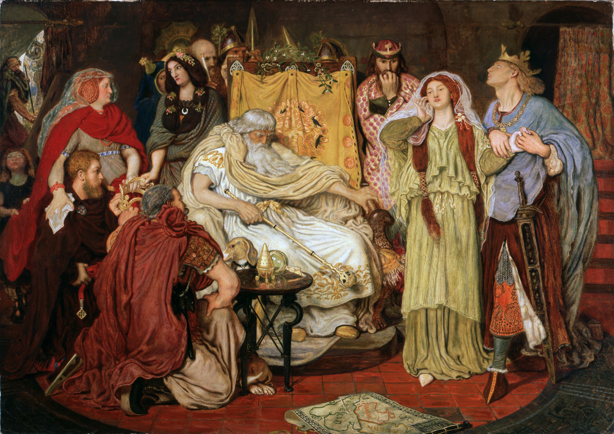 Cordelia's Portion